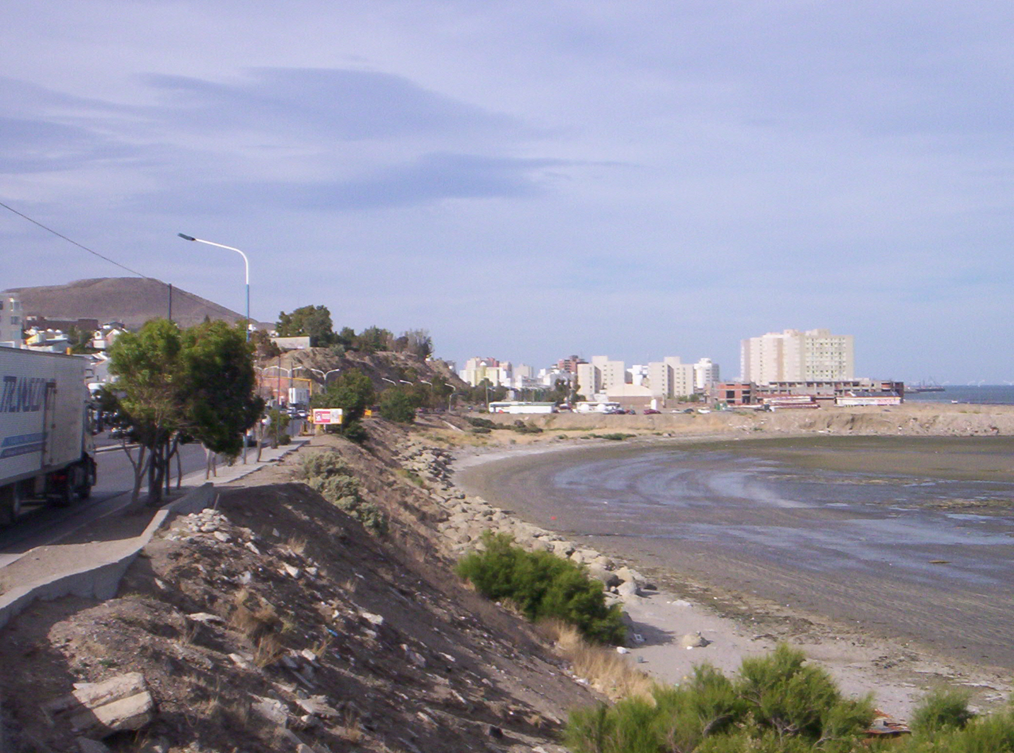 Comodoro Rivadavia desde la Ruta 3, con numerosas y diversas edificaciones de distintos tamaño.